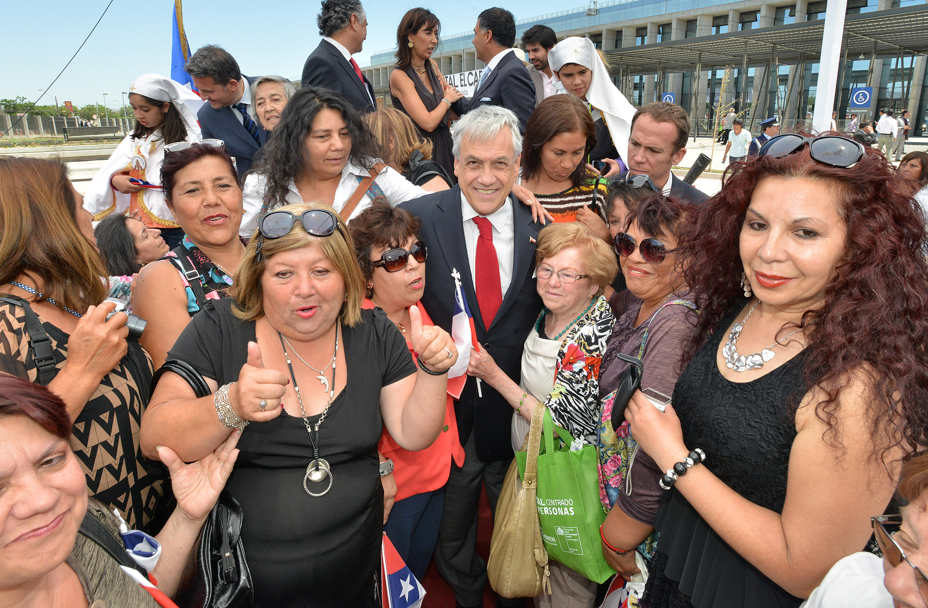 El presidente de Chile, Sebastián Piñera (al centro de la imagen), junto a un grupo de maipucinos durante la inauguración del Hospital El Carmen, D. Luis Valentín Ferrada. Maipú, Santiago de Chile, 7 de diciembre de 2013.